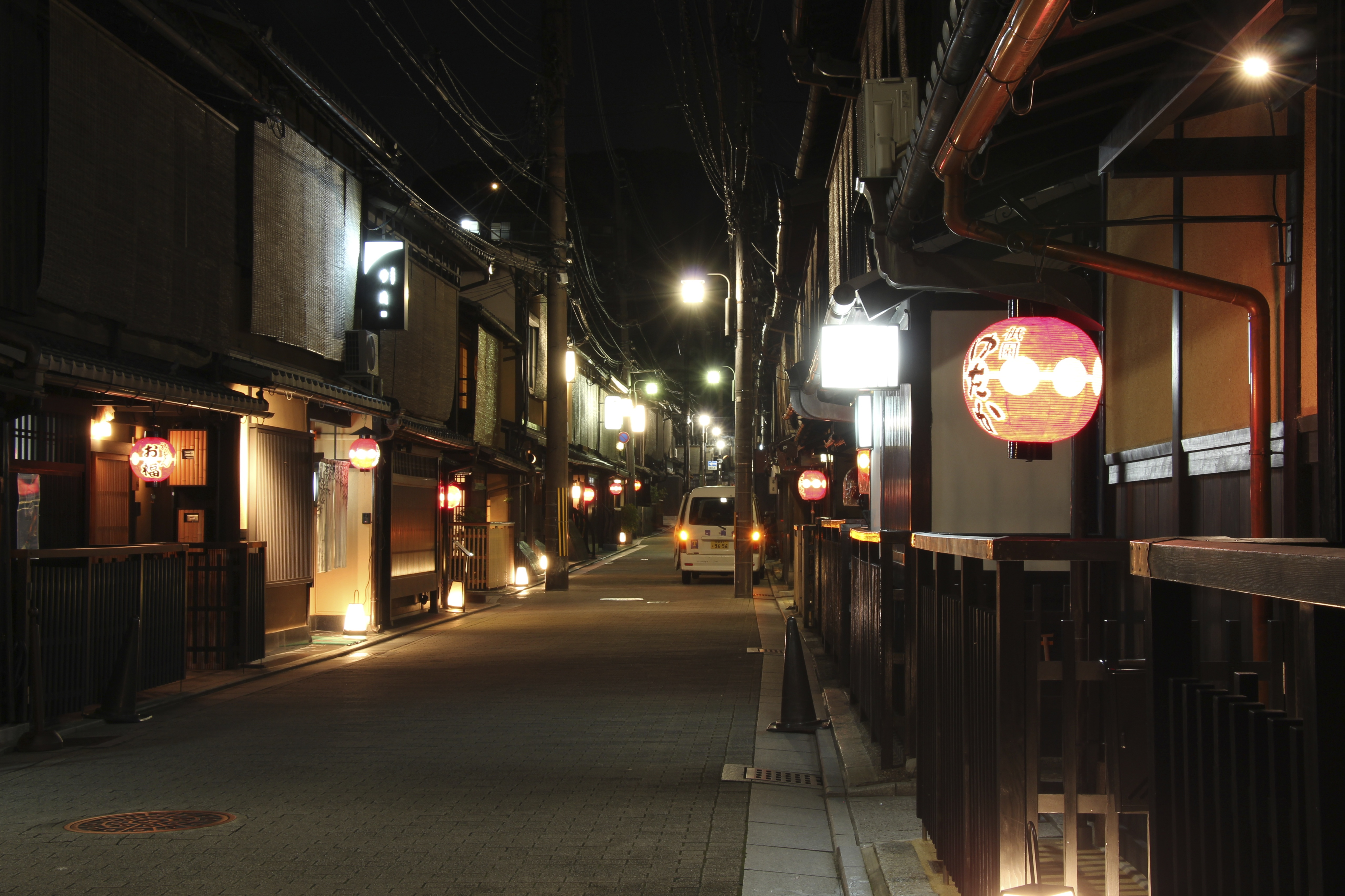 京都 祇園 夜景